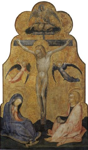 Crucifixion